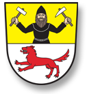 znak obce Mutěnín (okres Domažlice)